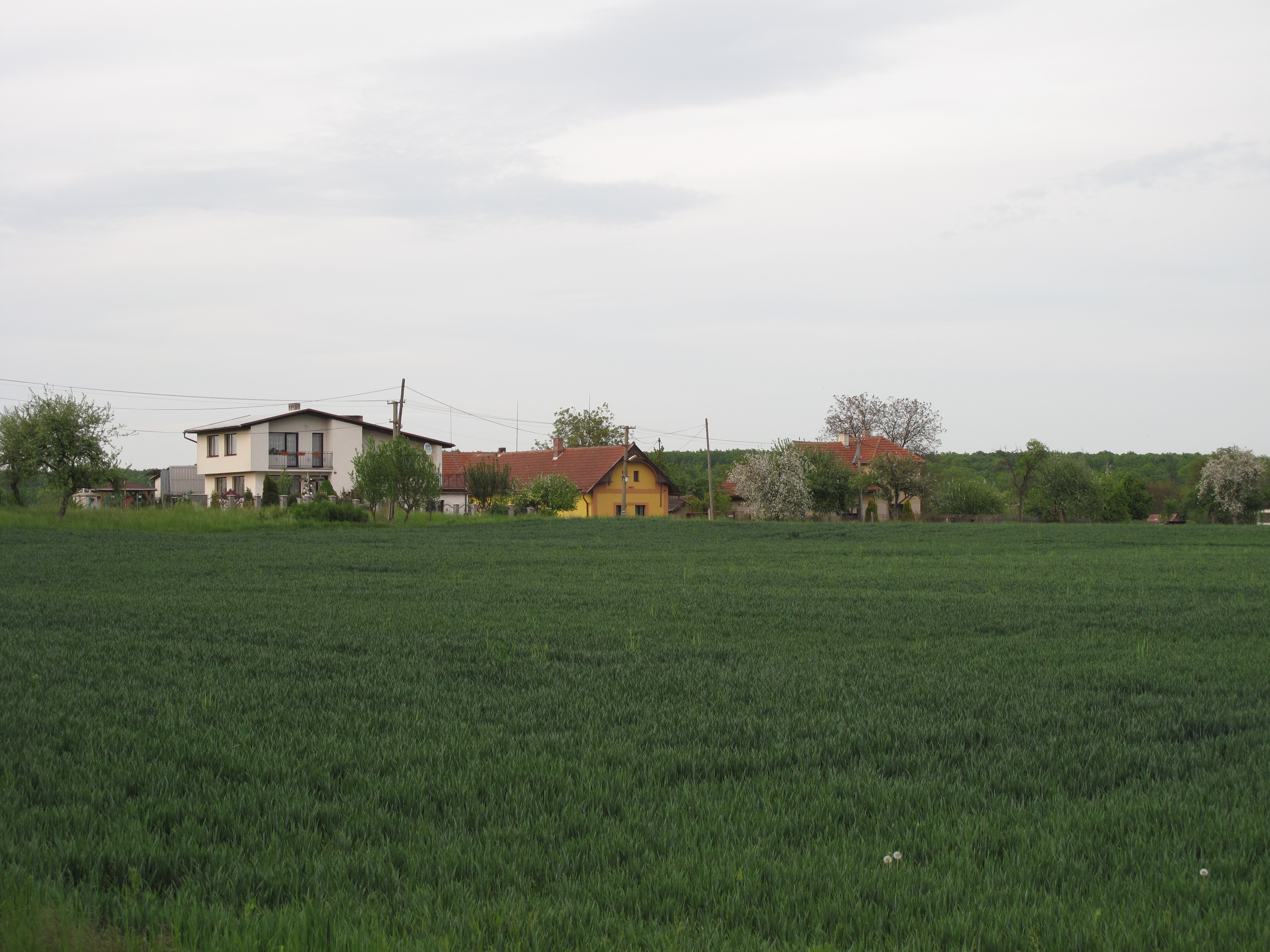 Domy v Ledečkách. Okres Nymburk, Česká republika.